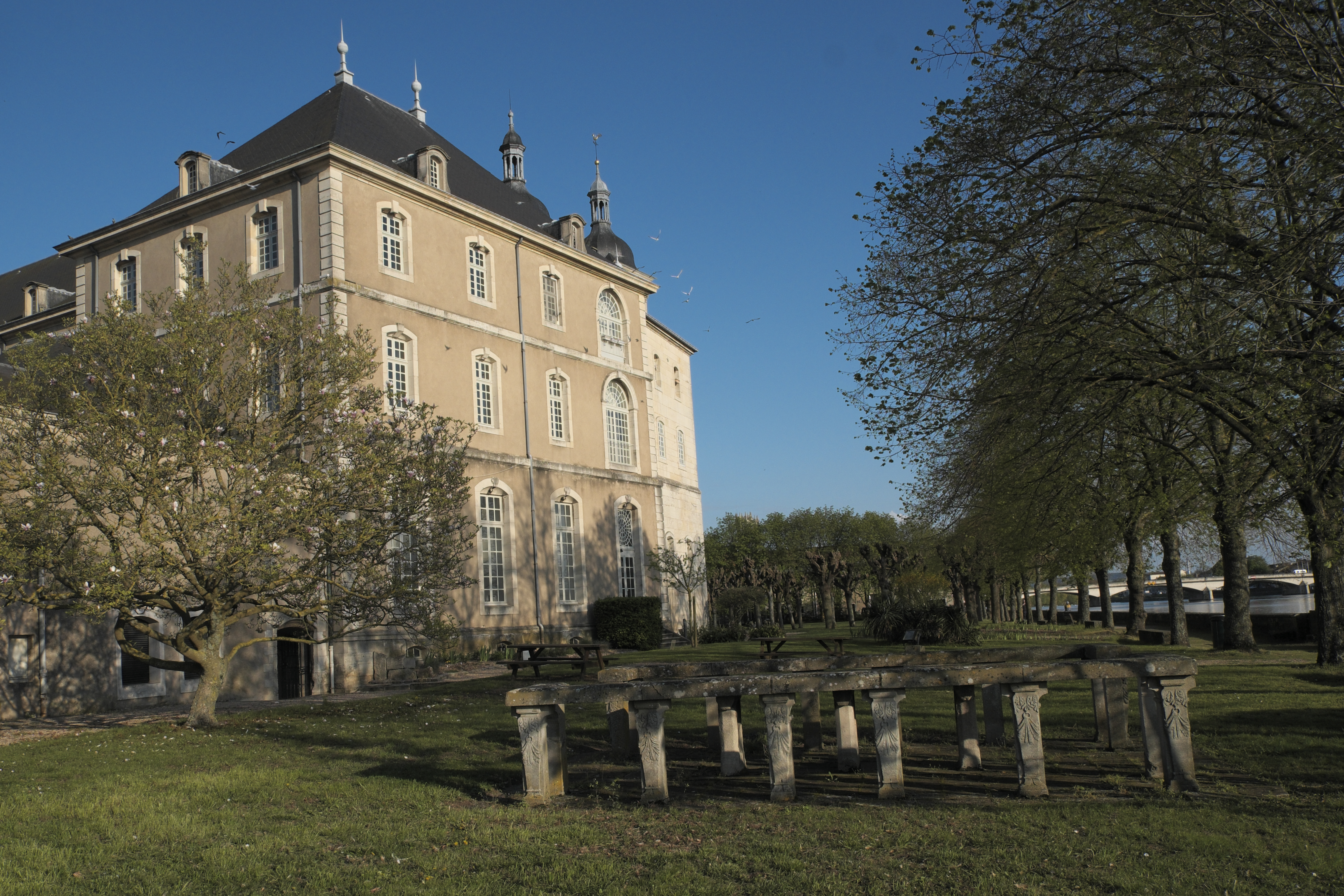 Ehemalige Prämonstratenserabtei in Pont-à-Mousson im Département Meurthe-et-Moselle (Region Grand Est/Frankreich)